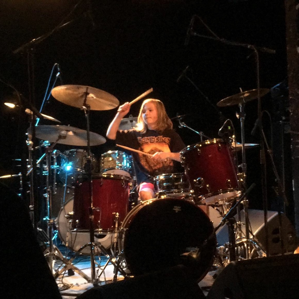 Johannes Thor Sandal, trommeslager i Golden Core på Blå 7. juli 2016. Foto: Jon Julius Sandal